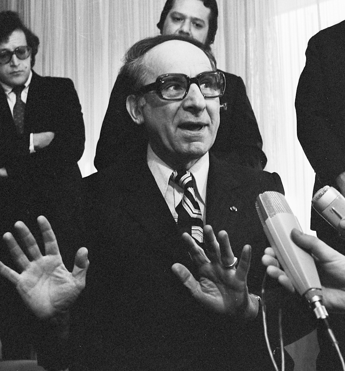 Perzische ambassadeur Abbas Farsanegan tijdens persconferentie